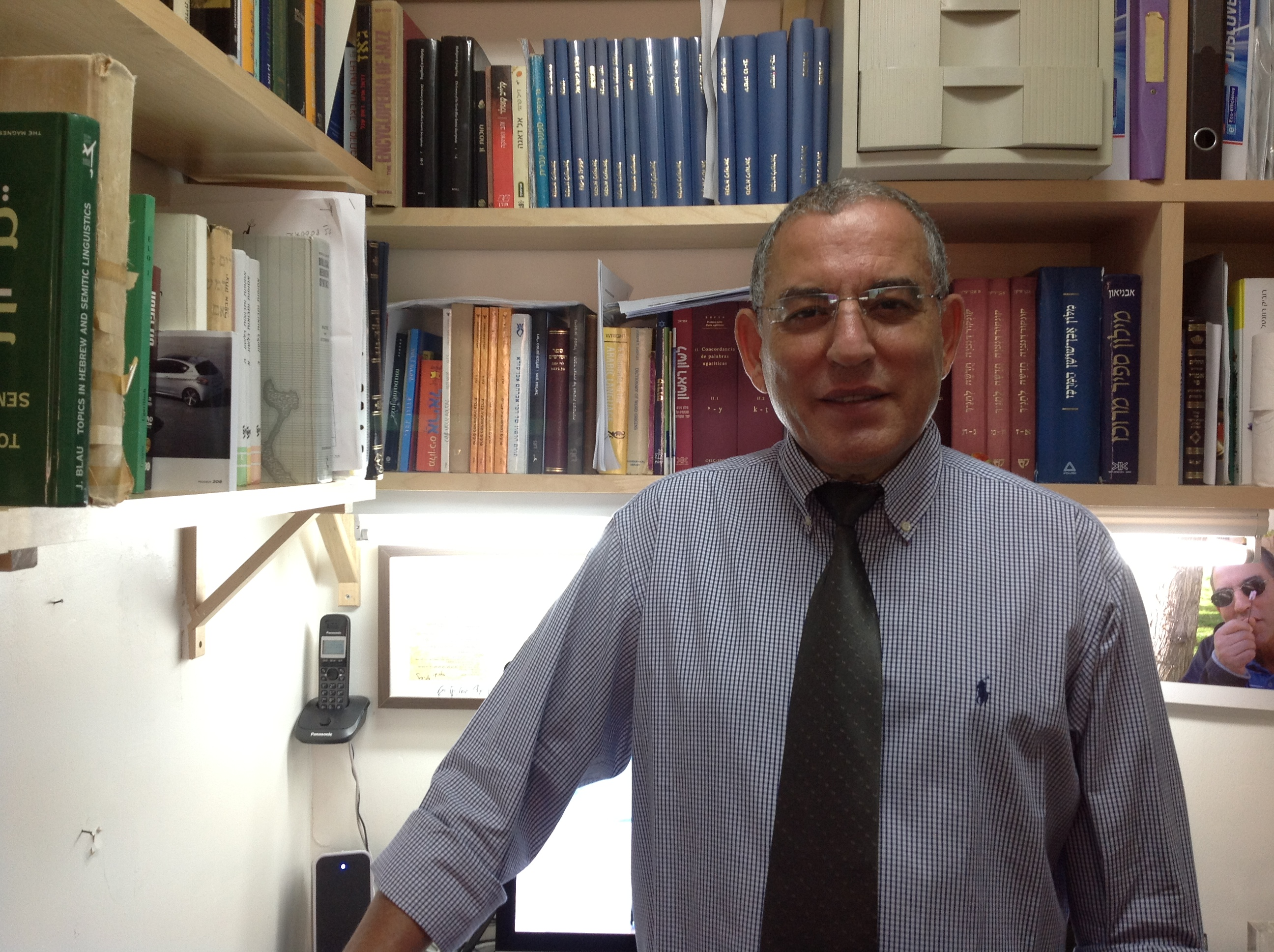 פרופסור דניאל סיון